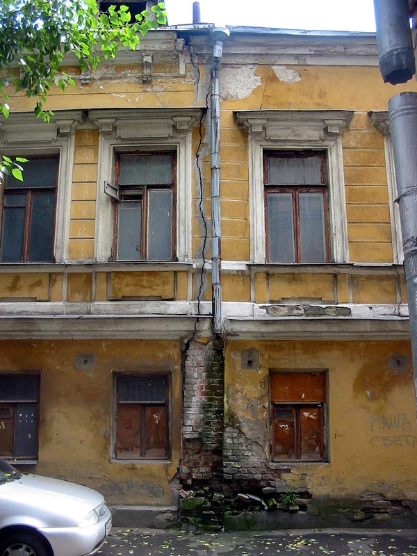 41, Sadovnicheskaya Street,Особняк купца 2-й гильдии Крымова Александра Александровича с 1880г. Moscow - destruction